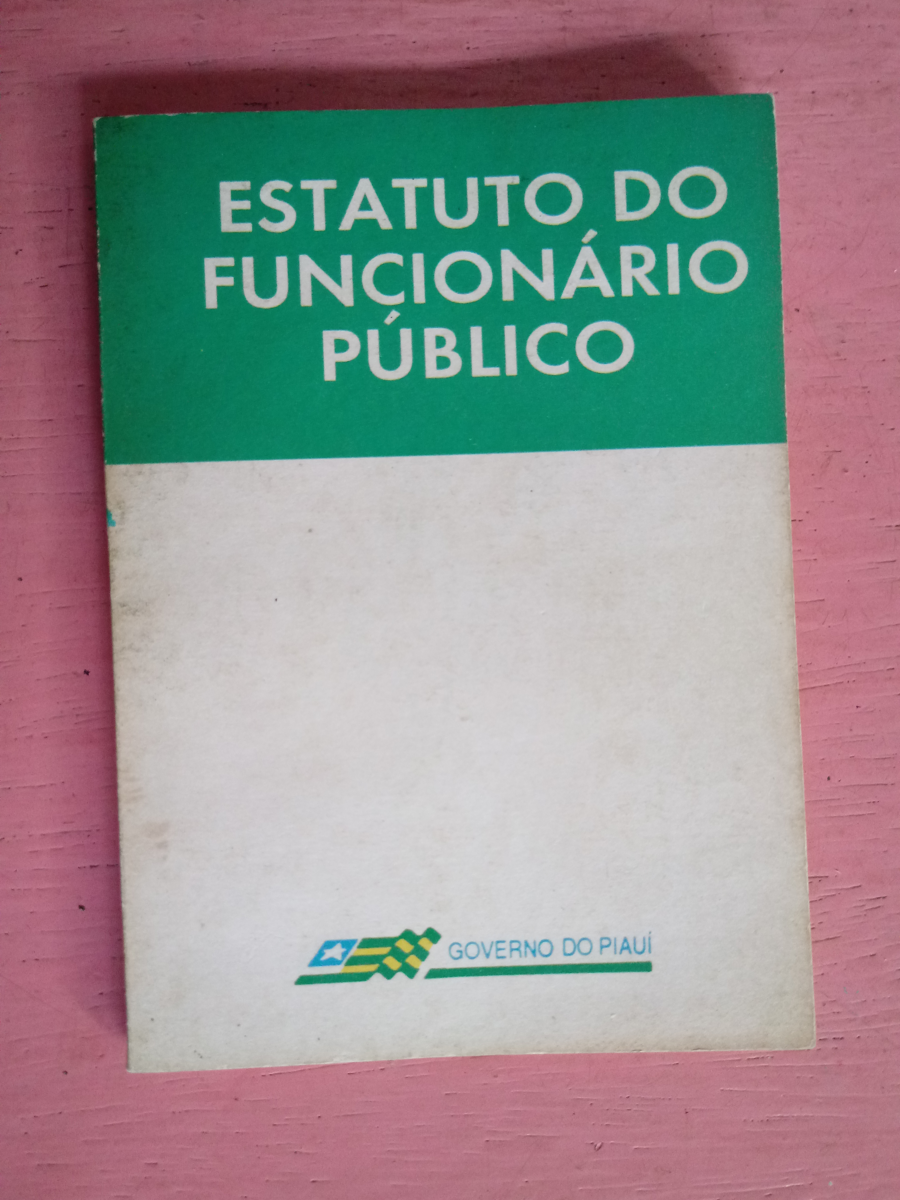 Estatuto do Servidor Público do Estado do Piauí no acervo da biblioteca da Universidade Estadual do Piauí.